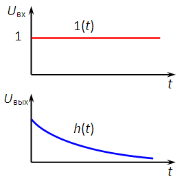 Входной сигнал и отклик линейной системы